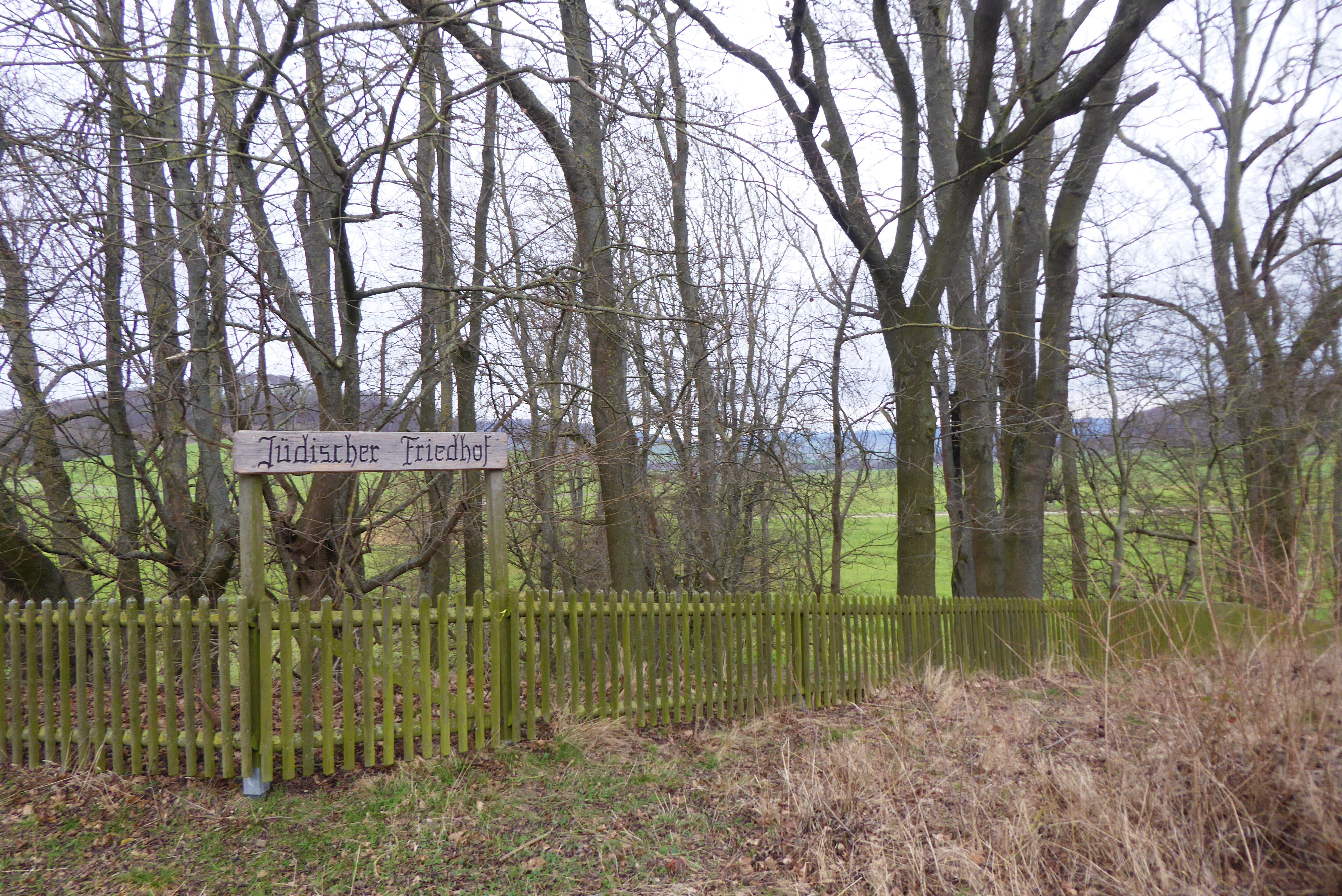 Jüdischer Friedhof bei Imbshausen, Stadt Northeim, Südniedersachsen; ausgewiesen als Baudenkmal. Gelegen in einer alten Mergelgrube